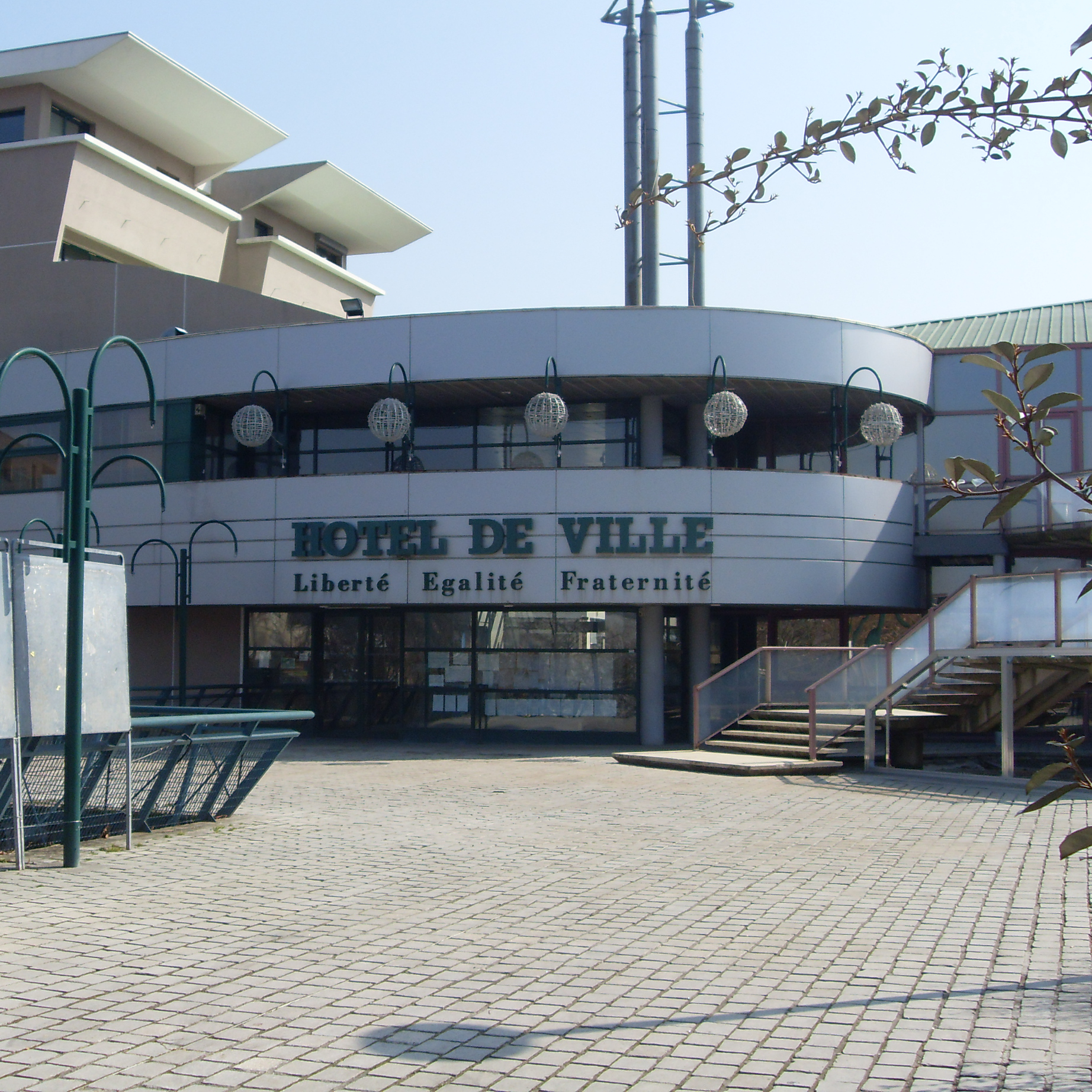 Mairie de de Villefontaine (Isère)